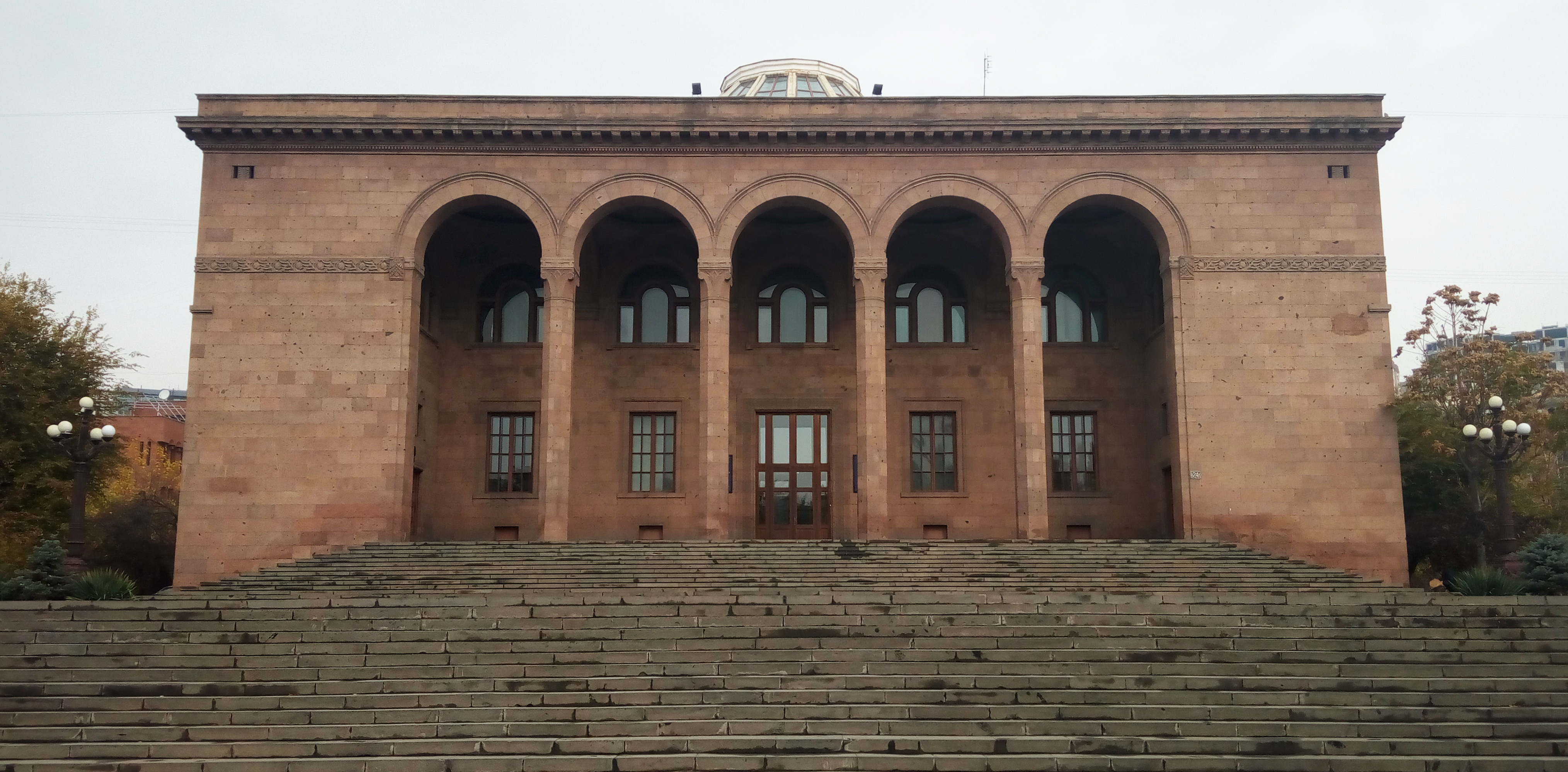 Sede ICRANet presso il NAS RA in Armenia